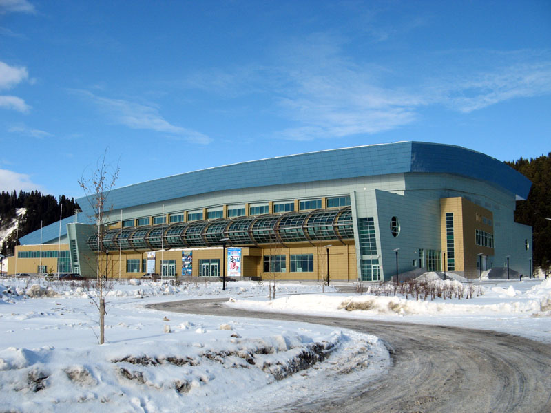 Ледовый дворец в Ханты-Мансийске